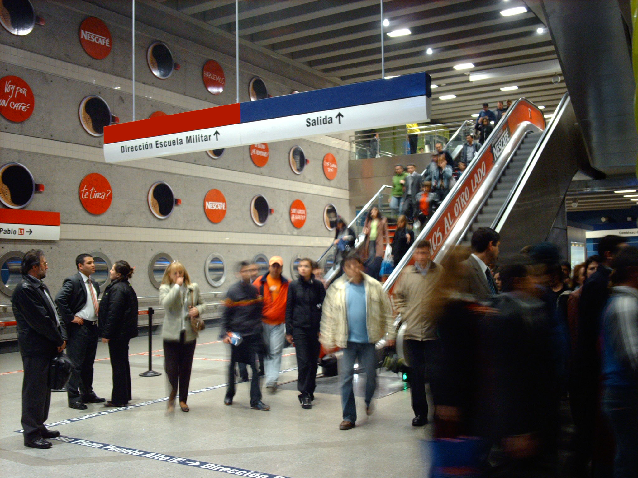 Estación Tobalaba Transferencia L1-L4